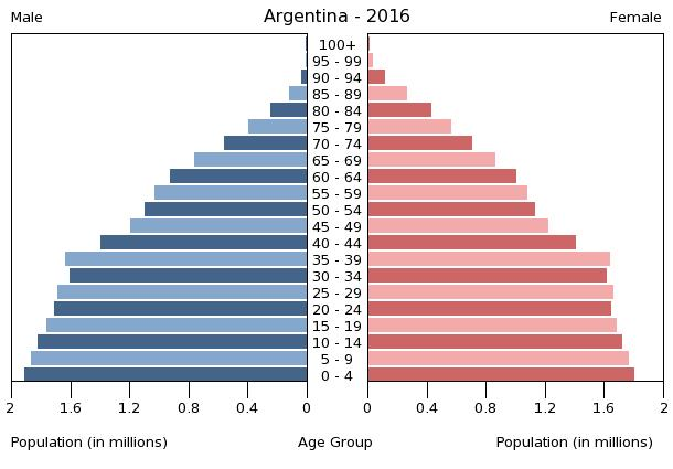 Argentiniens Bevölkerungspyramide im Jahr 2016